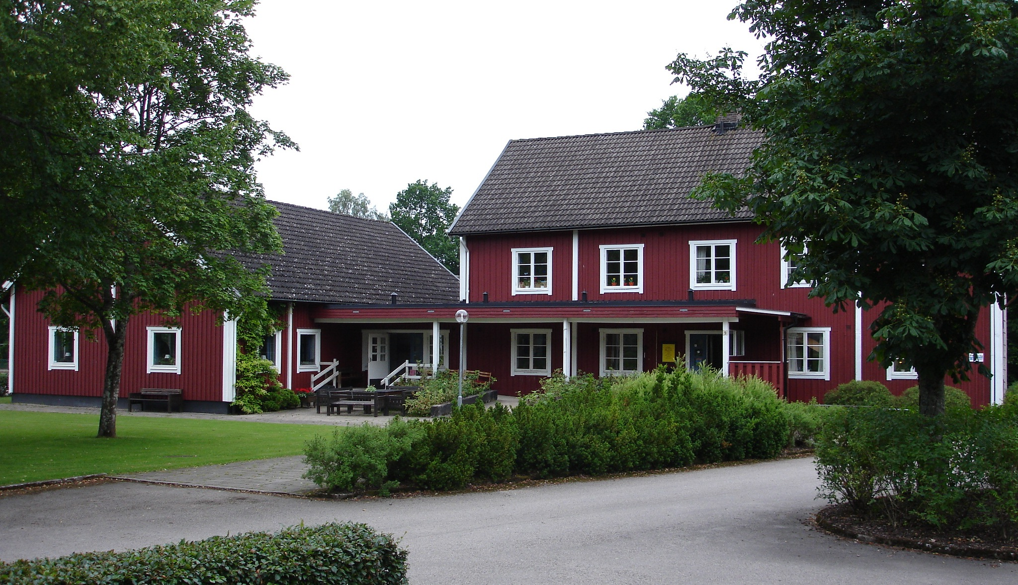 Församlingshemmet vid Traryds kyrka, sydvästra Kronobergs län i Markaryds kommun